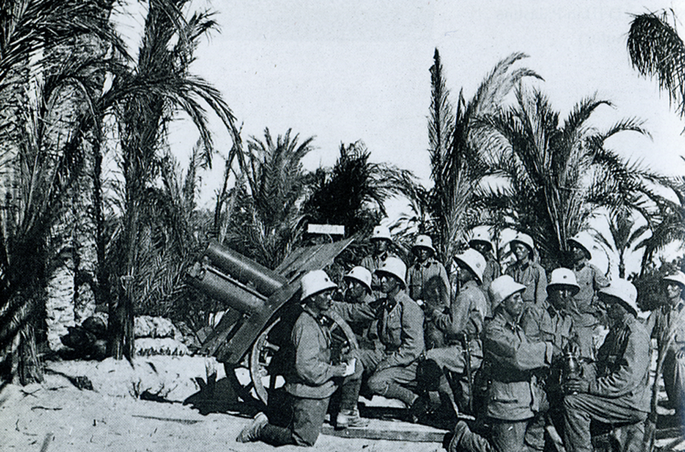 10 cm M. 8 oder M. 10 k.u.k. Gebirgshaubitze in Feuerstellung in Palästina